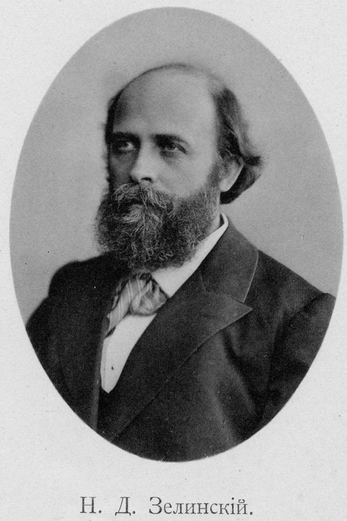 Николай Дмитриевич Зелинский (1861—1953) — химик, создатель научной школы, один из основоположников органического катализа и нефтехимии. Наиболее известен как изобретатель первого эффективного противогаза. Профессор Московского университета.